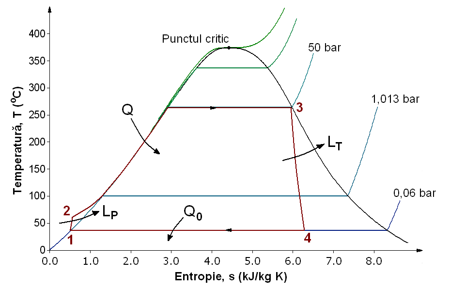 Un ciclu Clausius-Rankine cu apă reprezentat în diagrama T-s, gradată în unităţi SI. Diagrama a fost trasată pe baza formalizării IAPWS IF-97 folosind macrourile aplicaţiei libere openoffice-calc de la S-a folosit temperatura exprimată în °C, ca în tabelele termodinamice uzuale. Izobarele sunt trasate la presiunile de 0,06 bar, 1,01325 bar (1 atm), 50 bar, 150 bar şi 221 bar. Creşterea temperaturii în pompă este mult exagerată, în scop didactic, pentru claritatea funcţionării ciclului între 50 şi 0,06 bar.